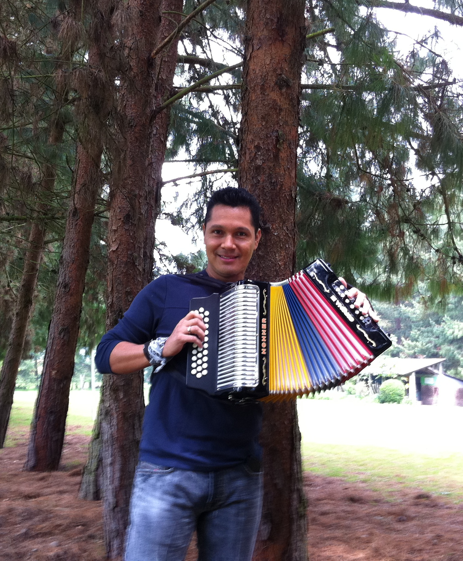 Jimmy Zambrano con un acordeón Hohner